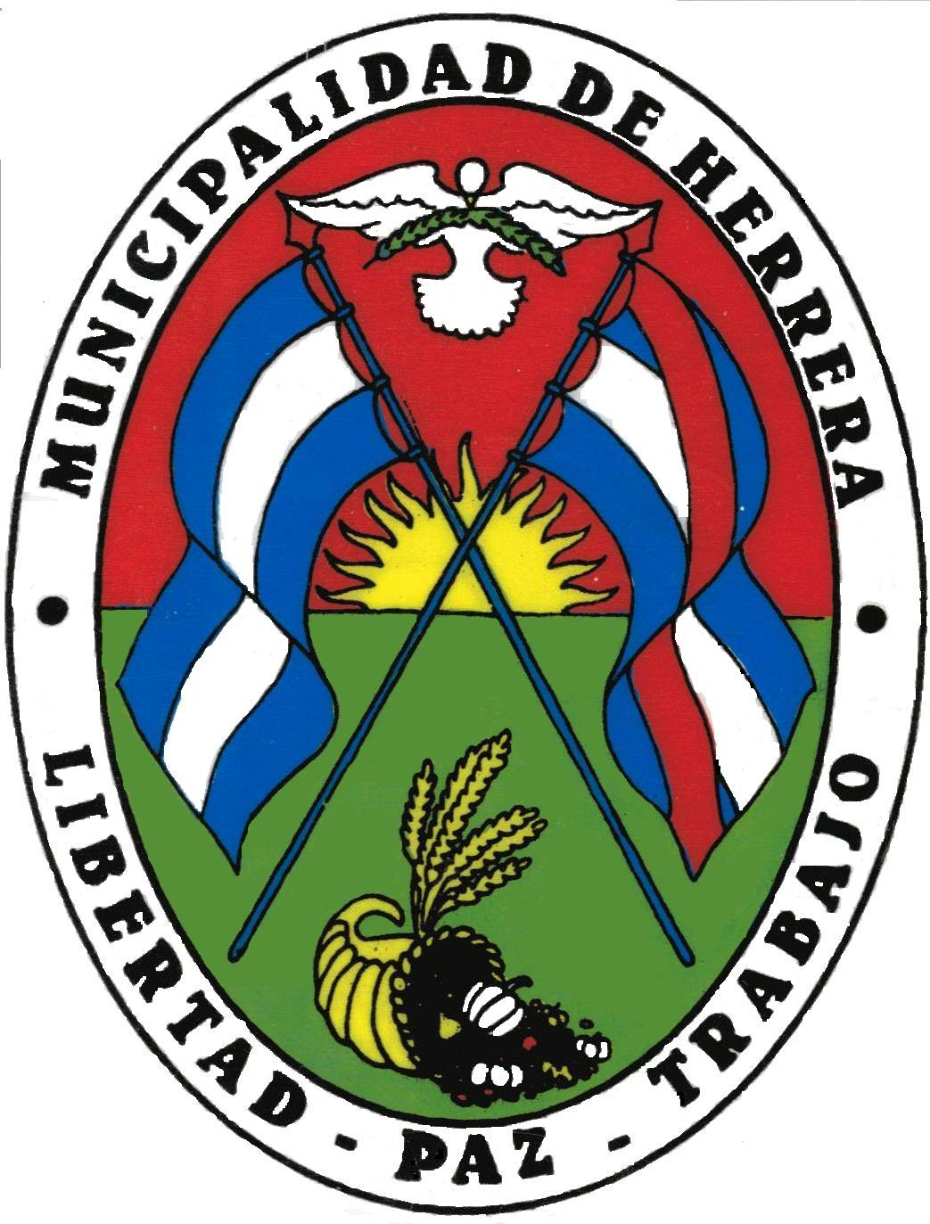 Escudo oficial de la Municipalidad de Herrera Provincia de Entre Ríos Argentina